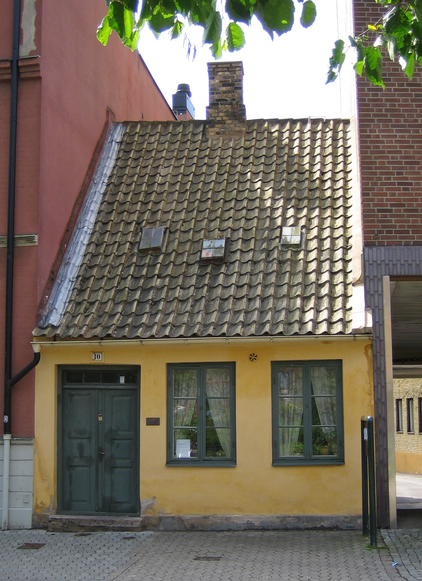 Ebbas hus, small museum in Malmö